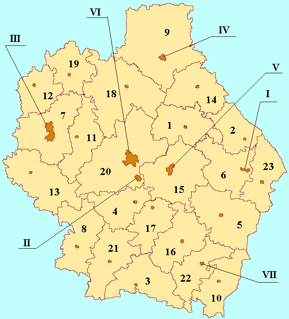 Tambov Oblast map by Al Silonov Карта районов Тамбовской области